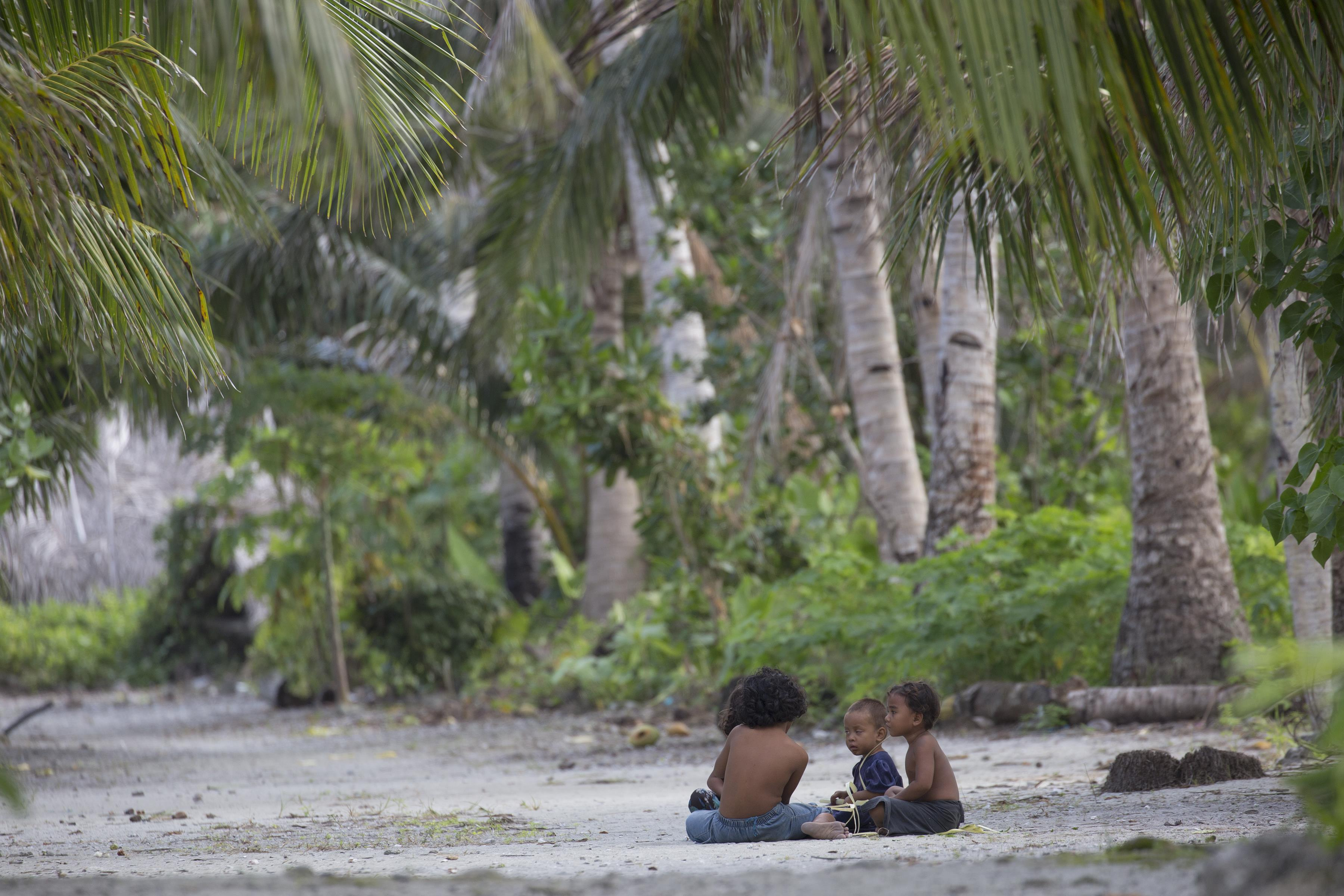 Des enfants assis sur le sol sur l'île de Fais